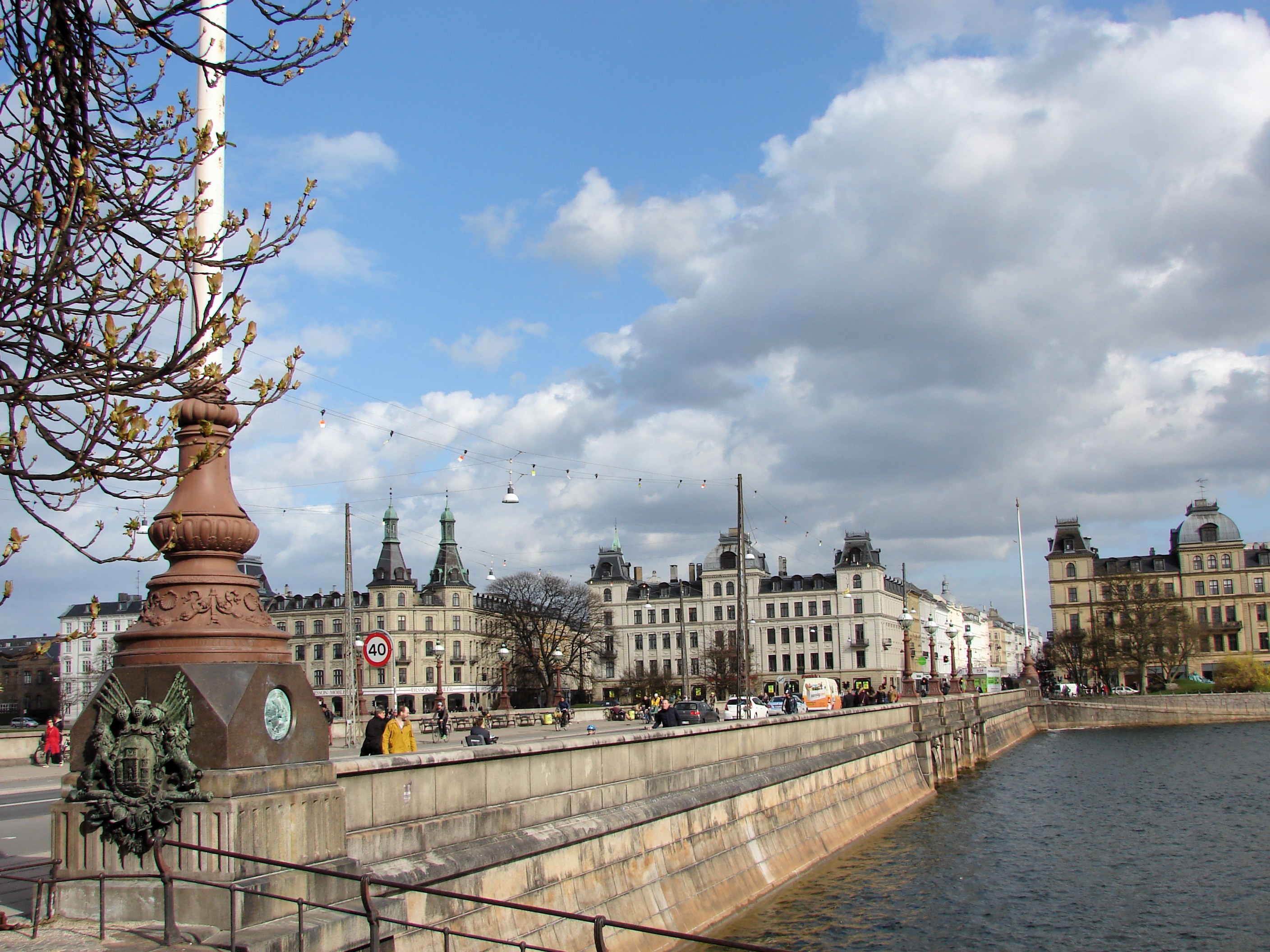 Dronning Louises Bro, set fra Nørrebro, København